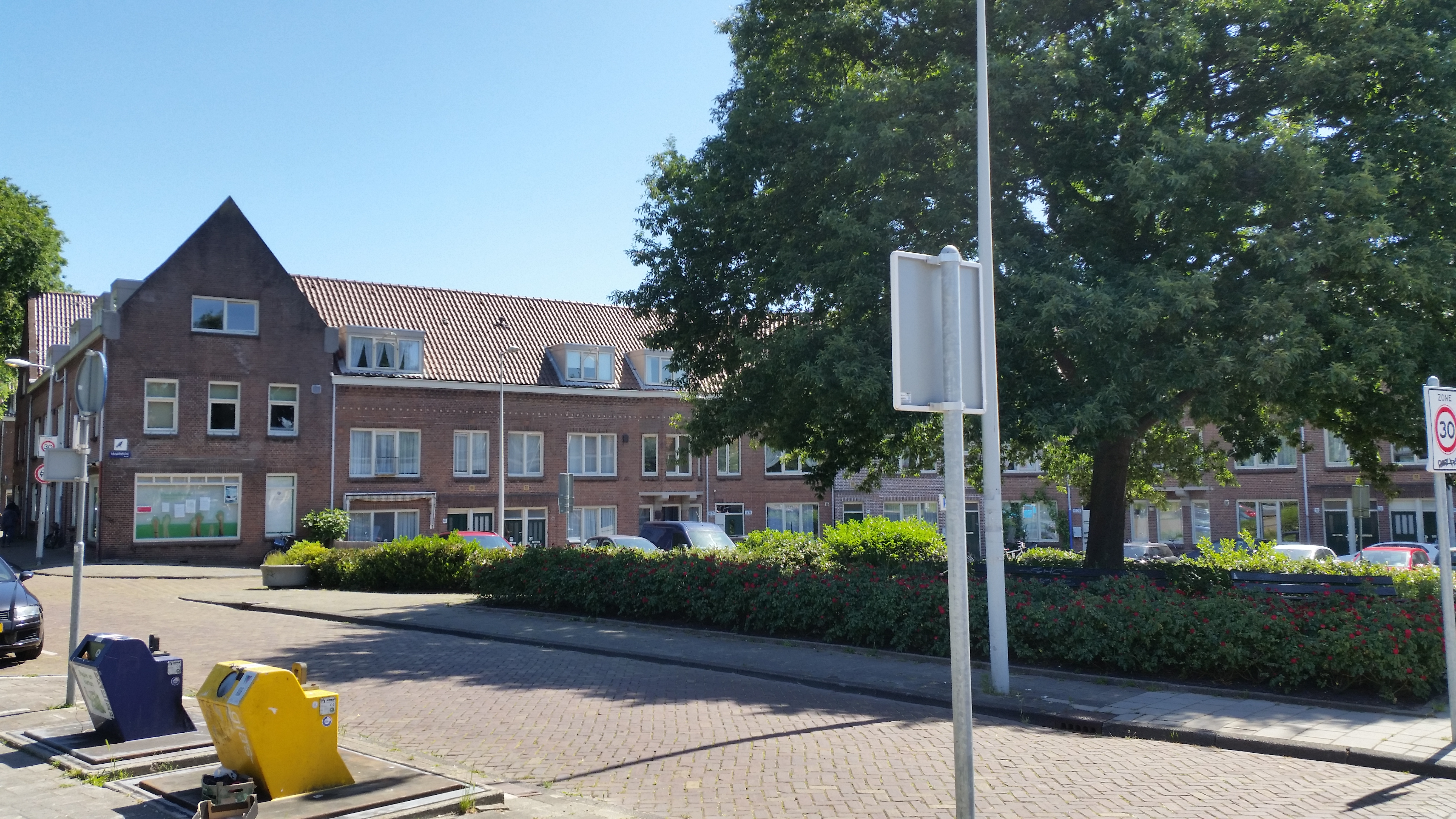 Impressie van het Kraaienplein, Amsterdam-Noord (mei 2020)